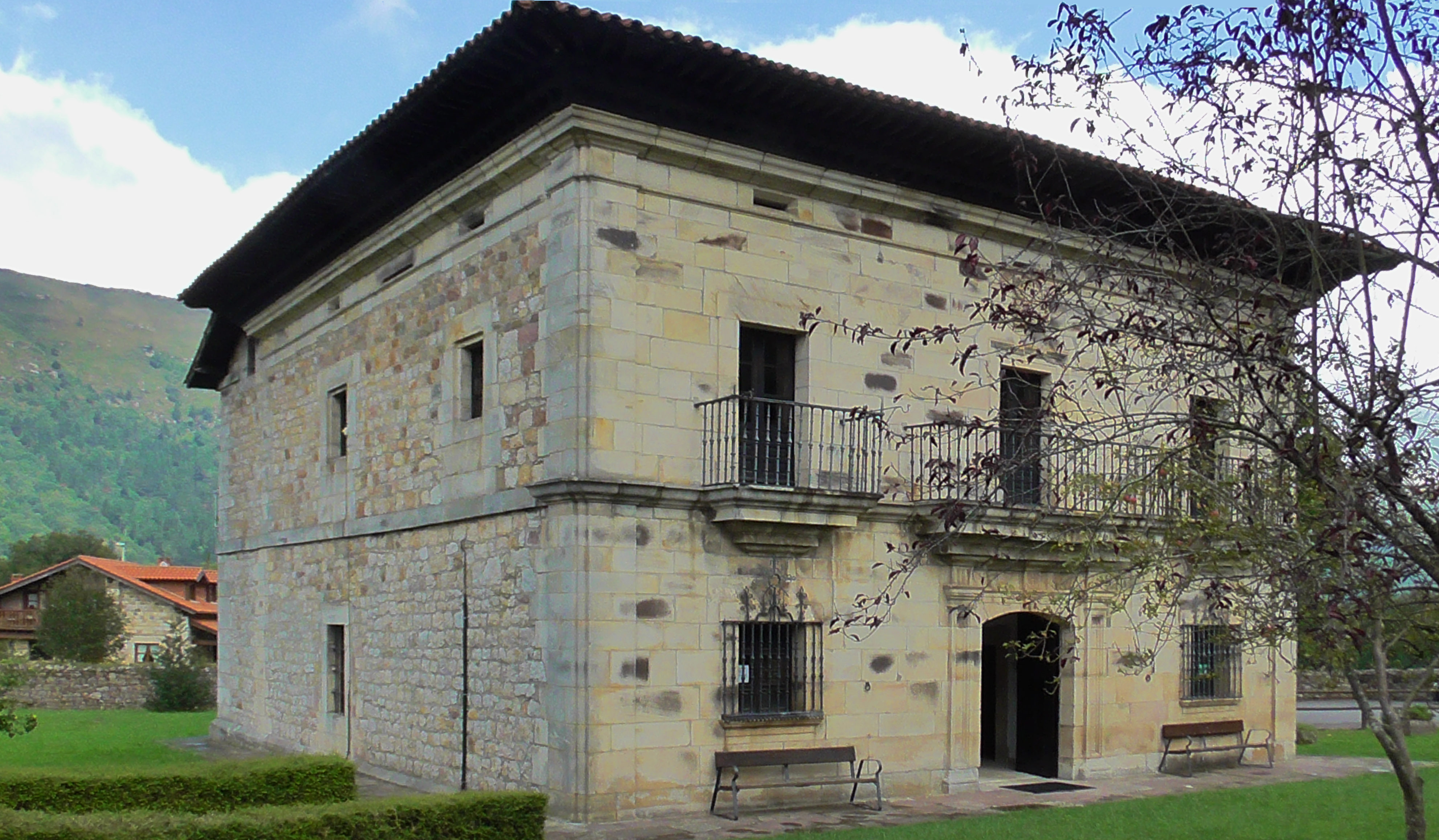 Edificio prinipal del Palacete del Mier. Se trata de una casa solariega con capilla, construida a finales del siglo XIX en estilo neoclásico con marcados rasgos barrocos y arquitectura montañesa.